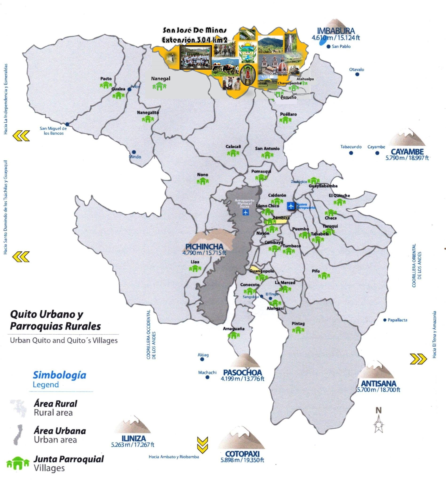 San José De Minas territorio Totalo 304 Km2